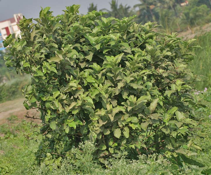 Domur Ficus hispida in Kolkata, West Bengal, India.